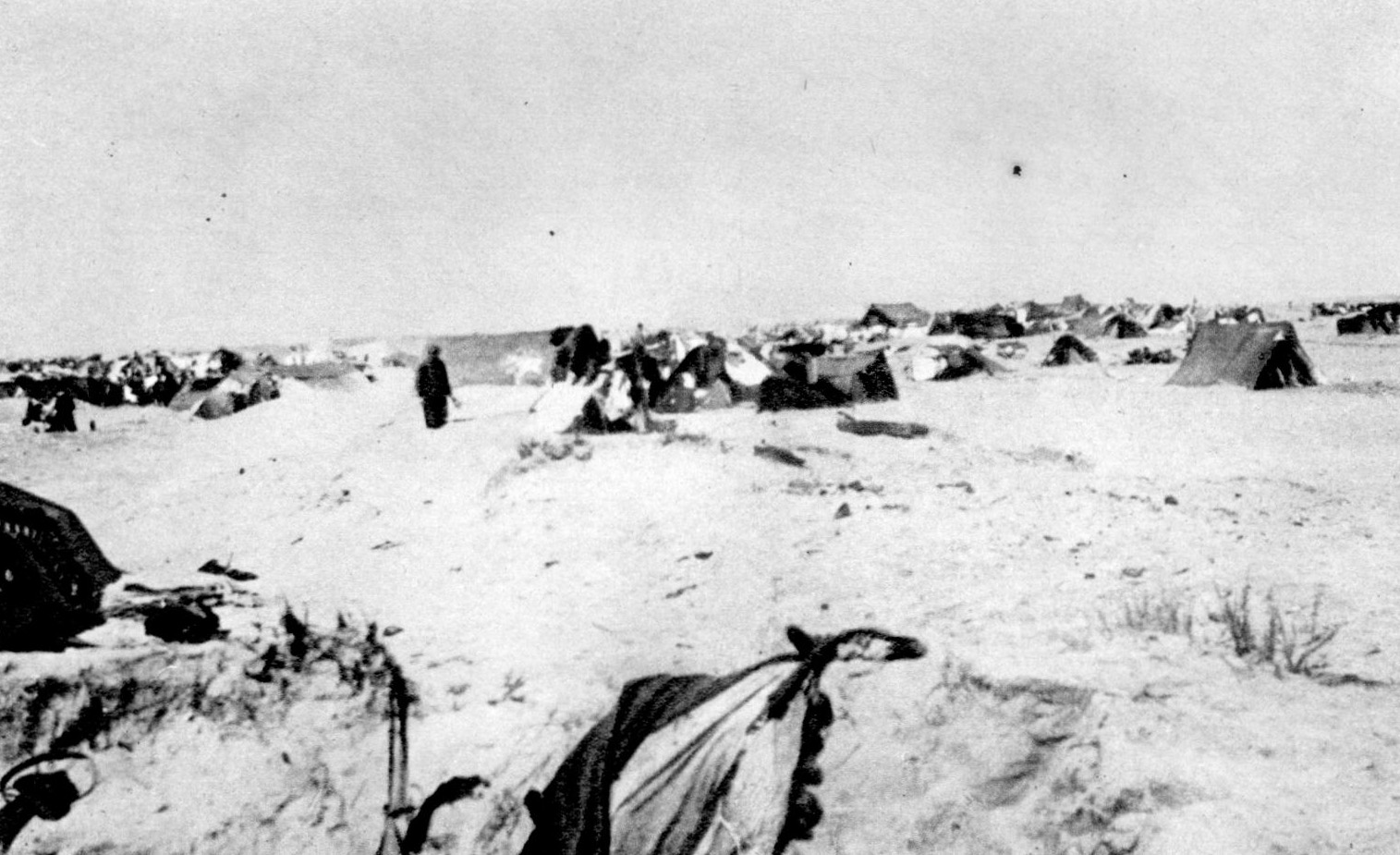 Francuski logor Arželes. Gola, peščana, hladna i vetrovita pustinja na obali Sredozemnog mora — to je bilo prvo prebivalište jugoslovenskih španskih boraca nakon povlačenja iz Španije.